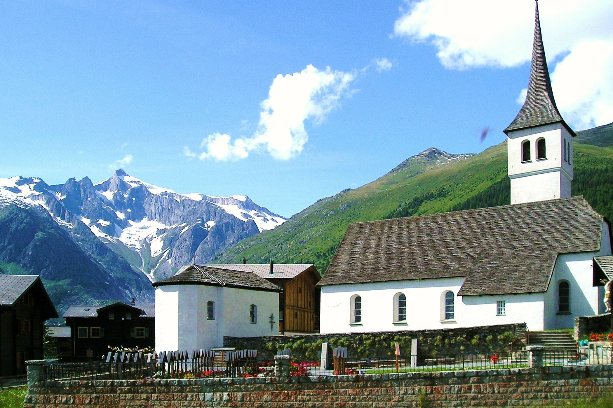 Kirche von Bellwald im Kanton Wallis mit Großer Wannenhorn